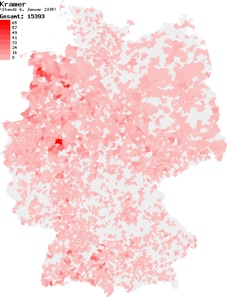 Verteilung des Nachnamens Kramer in Deutschland nach dem Telefonbuch mit Stand vom 6. Januar 2005